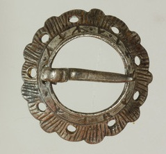 Skjortering, antakelig fra 1300-årene med runeinnskriften Margret a mek, (Margrete eier mig). Fra Namdalseid i Nord-Trøndelag. Foto NTNU Vitenskapsmuseet, T13107.